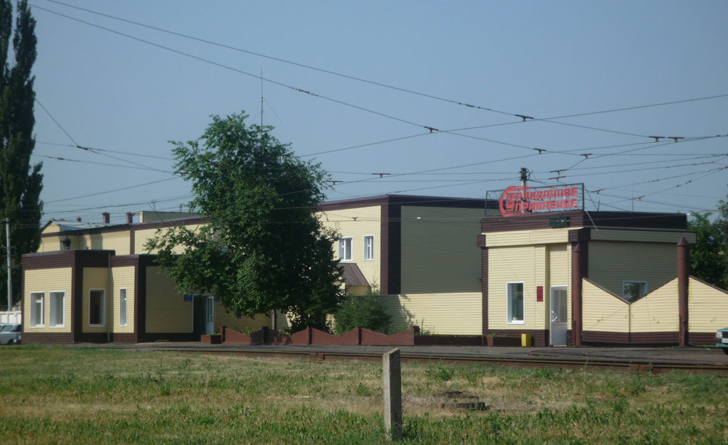 Трамвайное депо Салавата